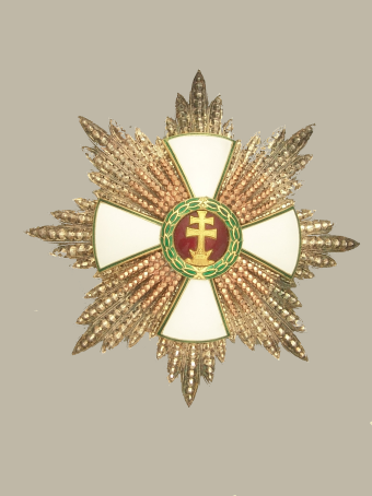 Magyar Érdemrend nagykereszt csillaga, 1936-1939 közötti változat